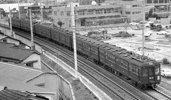 阪急814他今津線 1981年頃 西ノ宮北口-阪神国道